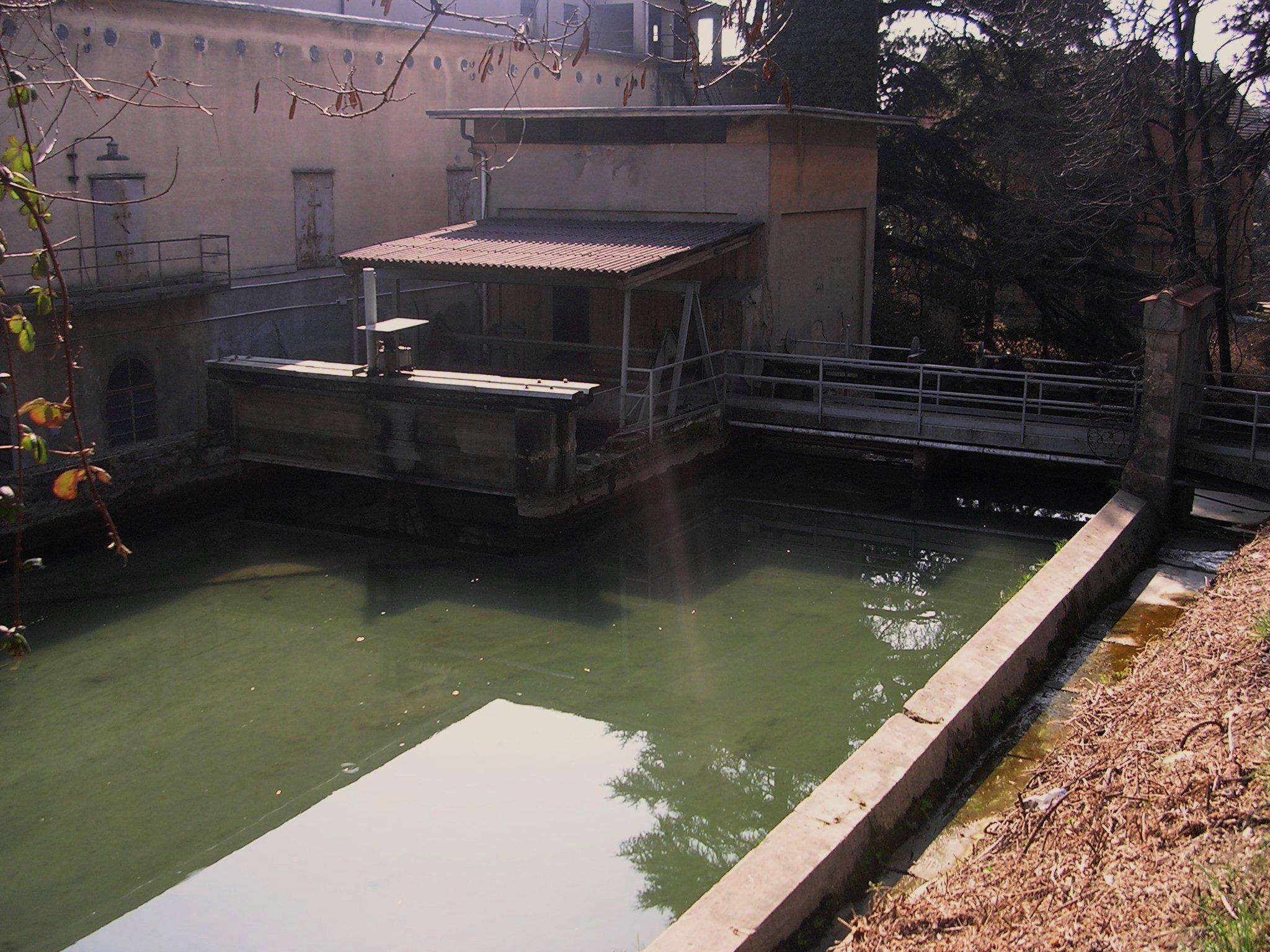 La roggia Serio Grande a Nembro (Bergamo), presso lo sbarramento della ditta Crespi